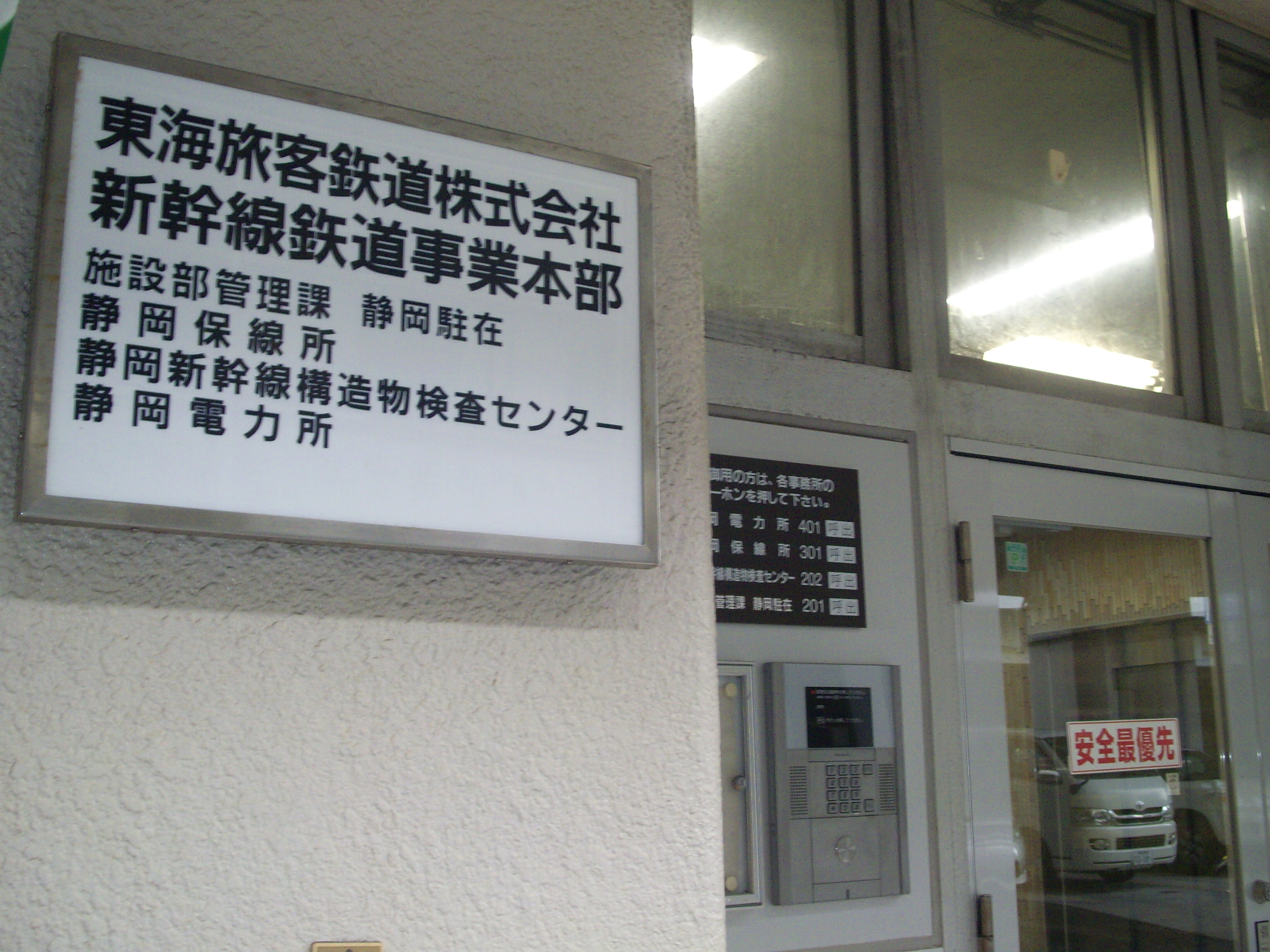 東海旅客鉄道新幹線鉄道事業本部静岡分駐所ビル。静岡保線所・新幹線構造物検査センター・静岡電力所も入居する。 Caution:Sorry！Built-in clock error!!